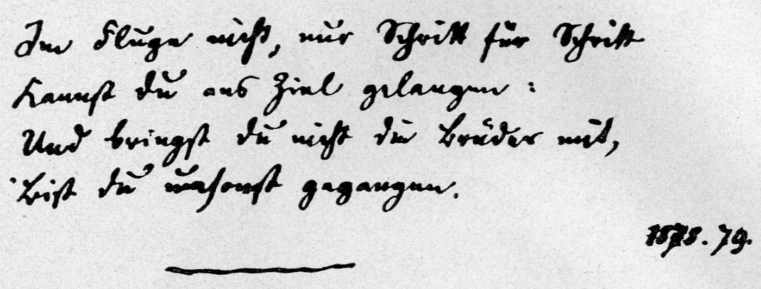 Autograph by Rudolf Hildebrand (1824—1894), German Philologist: "Im Fluge nicht, nur Schritt für Schritt/ Kannst du ans Ziel gelangen:/ Und bringst die nicht die Brüder mit,/ Bist du umsonst gegangen."